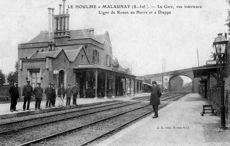 Intérieur de la gare vers 1900. Le bâtiment voyageurs est du à l'architecte anglais William Pite